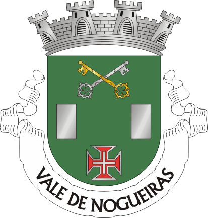 Brasão da freguesia de Vale de Nogueiras (concelho de Vila Real)